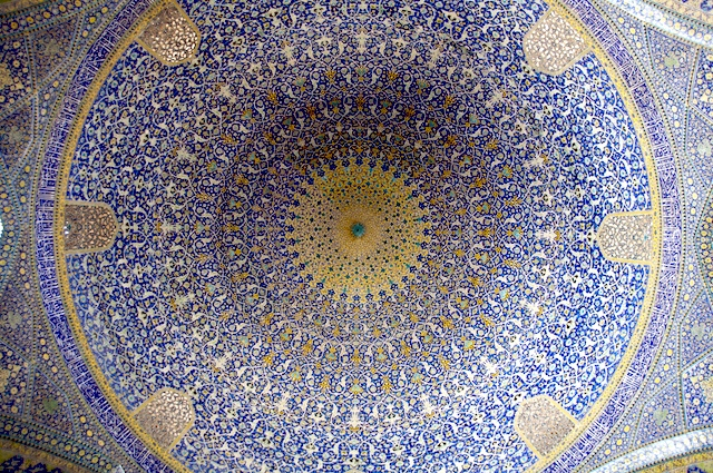 Imam Mosque (Masjed-e Imam), Esfahan, Iran